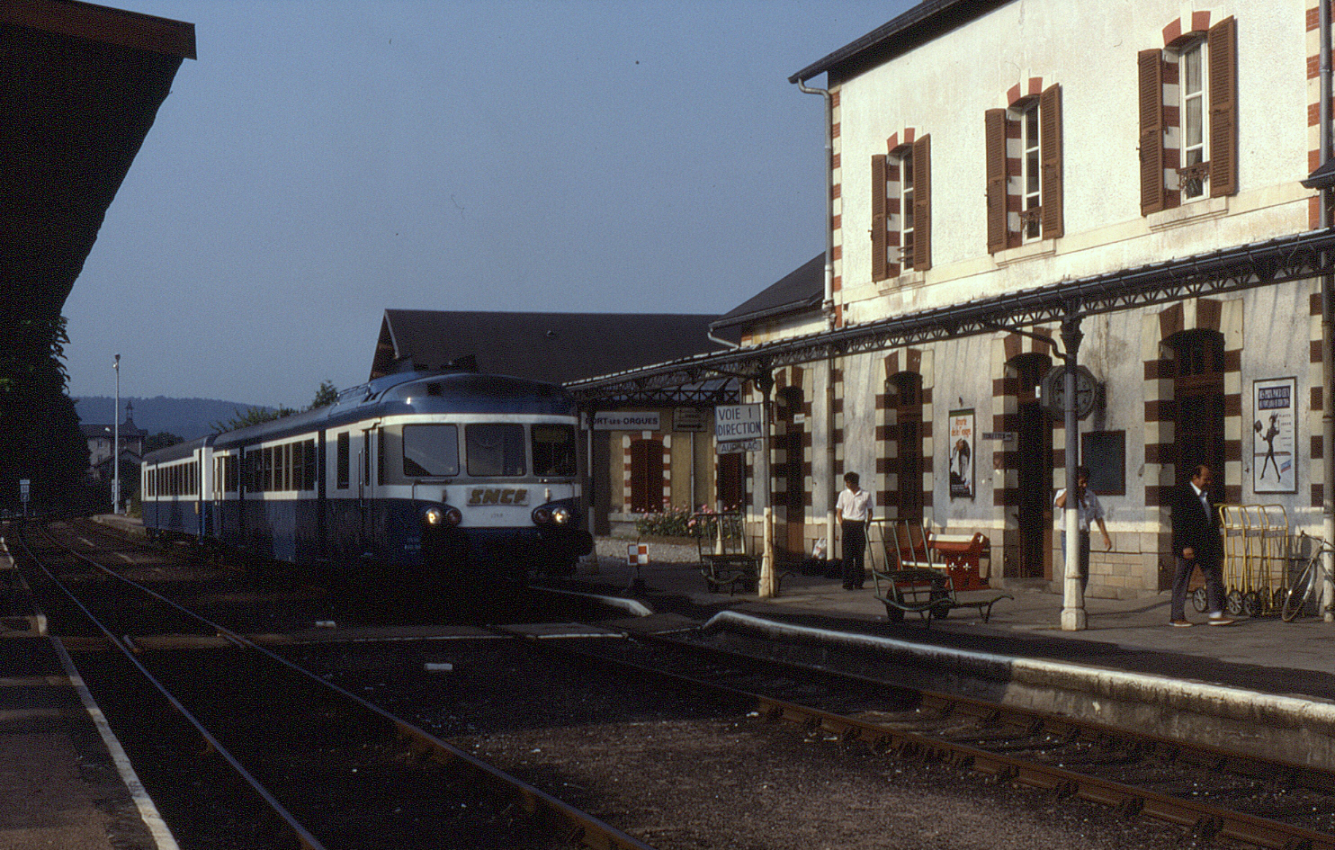 X 2818 at Bort-les-Orgues (France), 28 July 1990.